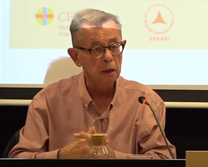 Los exilios de la Guerra Civil. Congreso La Guerra Civil Española: 27, 28 y 29 de noviembre de 2019.